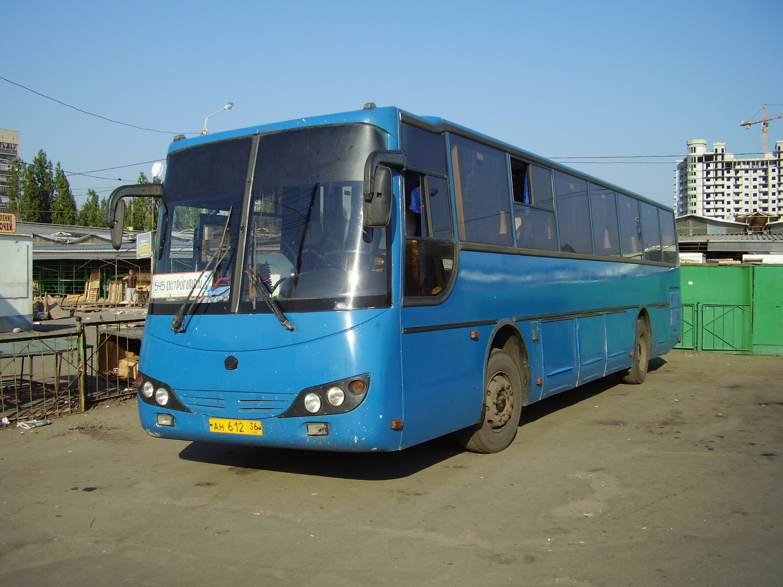 Мичуринский_автобус в Воронеже - Michurinsk's Bus, Voroneg